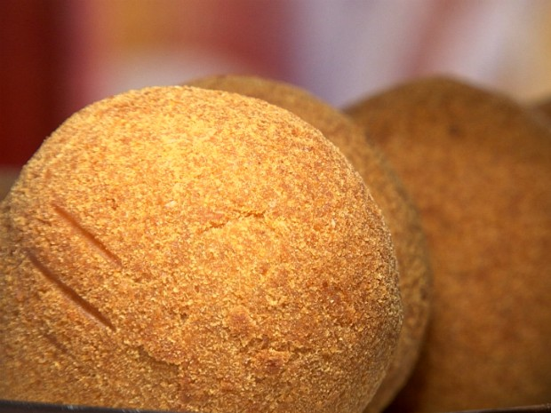 Famoso bolinho de carne em Serra dos Dourados